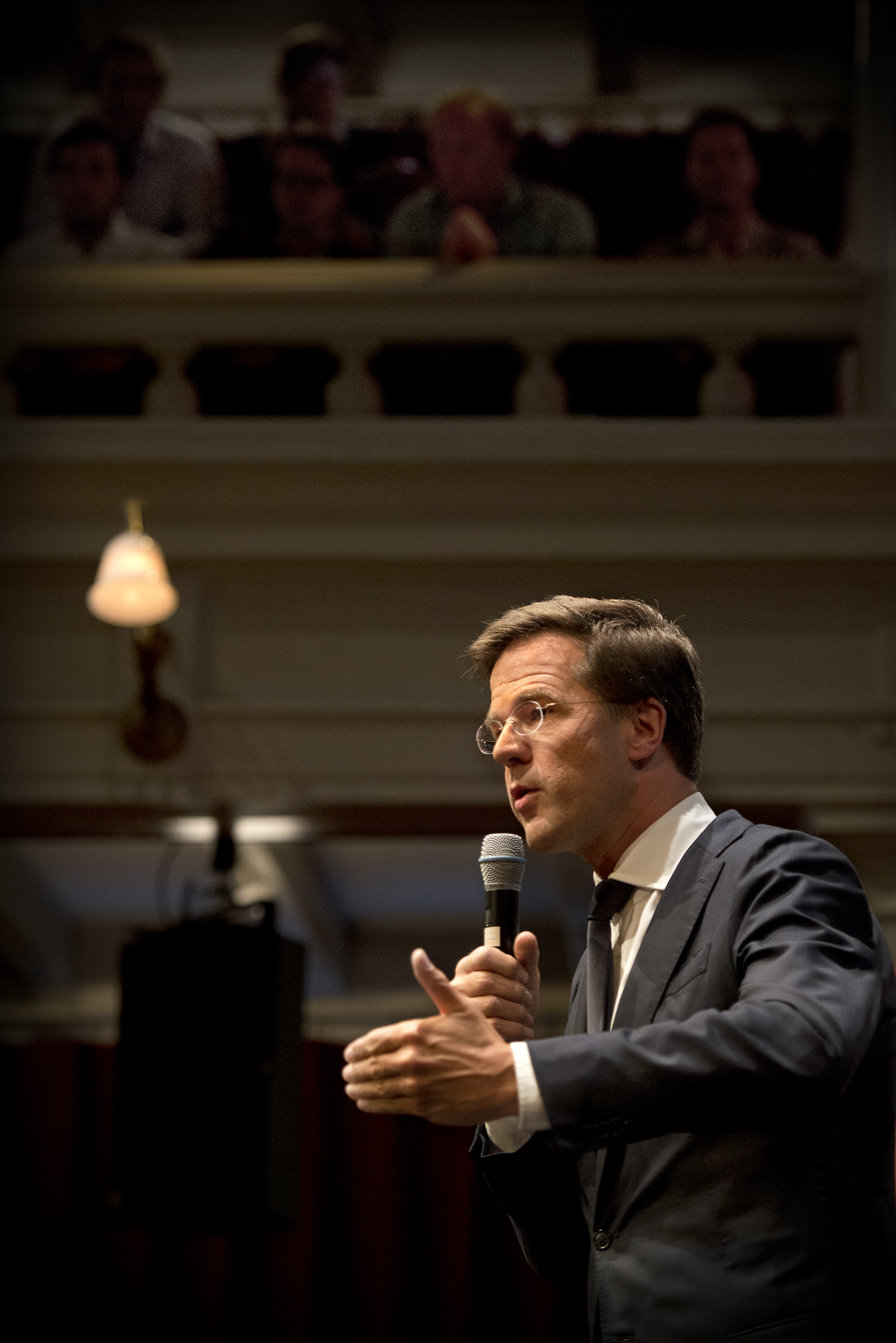 Minister-president Rutte tijdens de H.J. Schoolezing in de Rode Hoed in Amsterdam. ‘Dé manier om kwijt te raken wat we hebben, is vast te houden aan wat we hebben. We moeten veranderen en oude zekerheden loslaten om nieuwe zekerheden binnen het bereik van mensen te brengen’, aldus de premier. Lees hier de volledige lezing terug